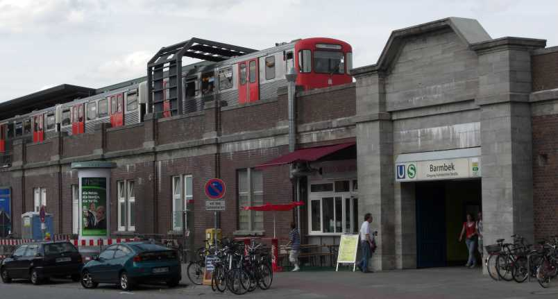 Eingang Fuhlsbüttler Straße des Barmbeker Bahnhofs 2009